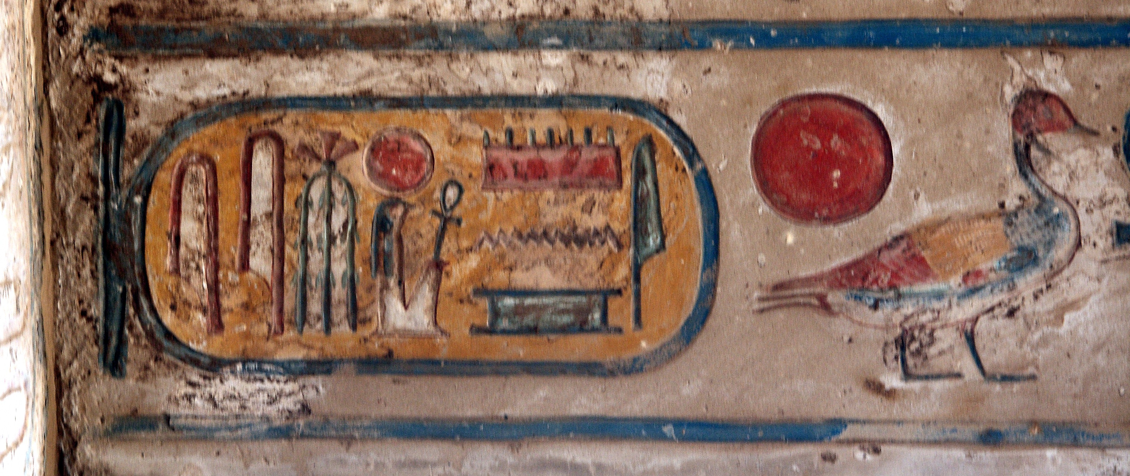 Karnak_temple, Großer_Säulensaal, Decke